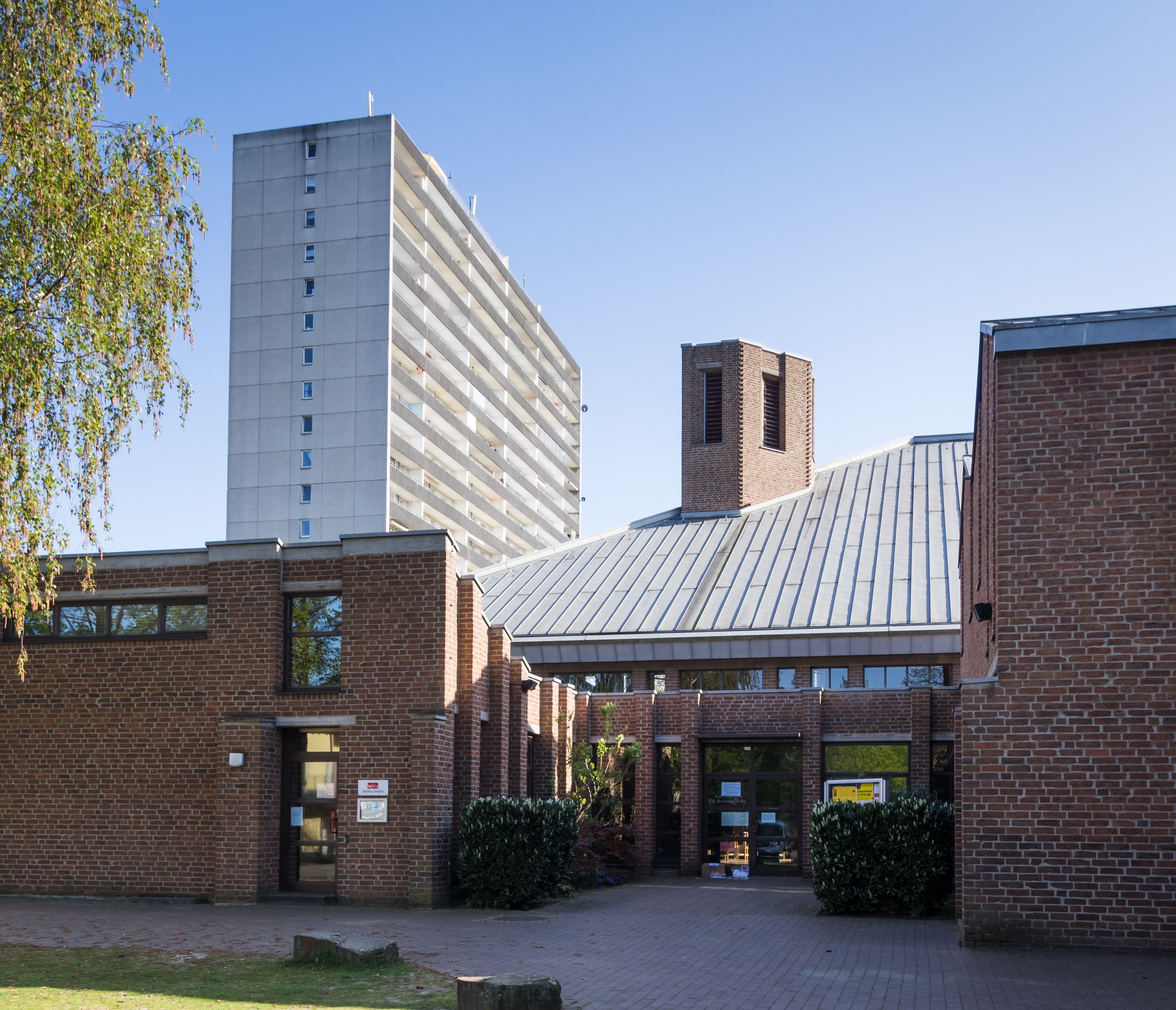 St. Maximilian Kolbe, Köln-Porz-Finkenberg, Architekt: Hans Schilling